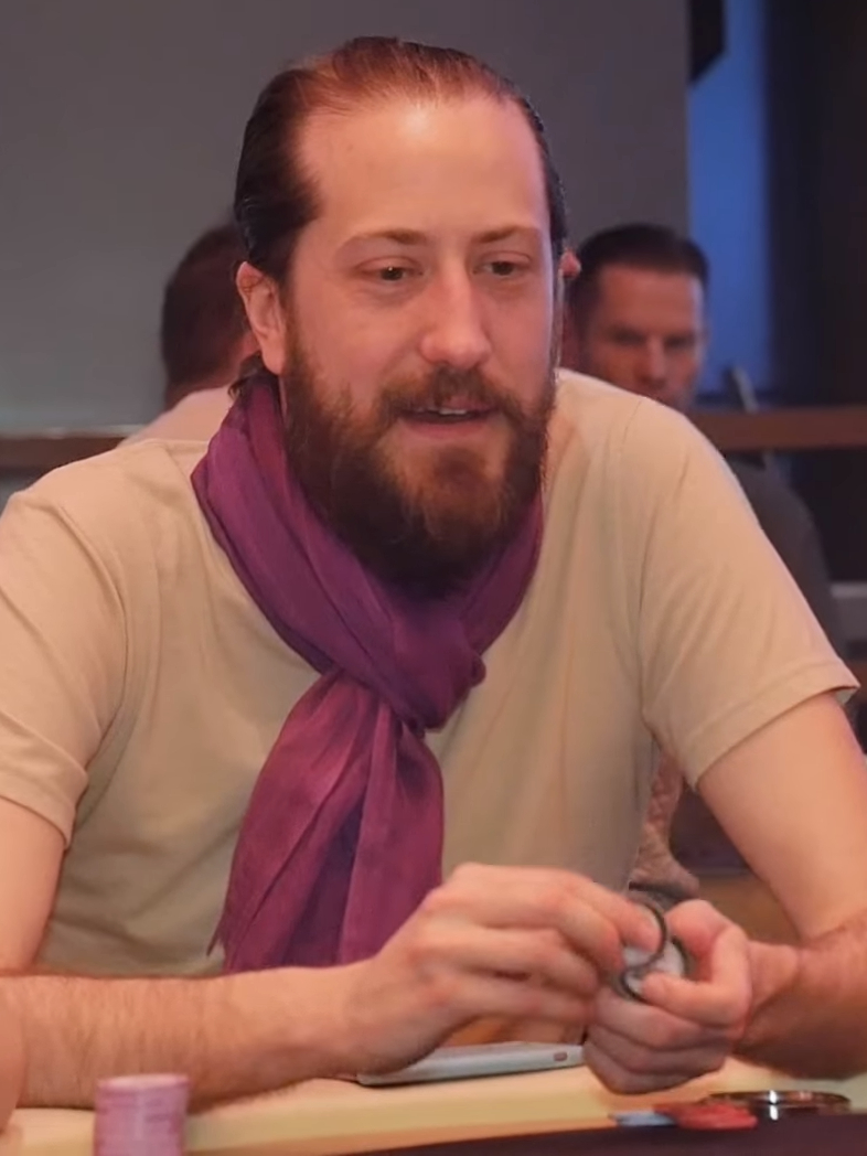 Steve O’Dwyer bei der WPT Amsterdam